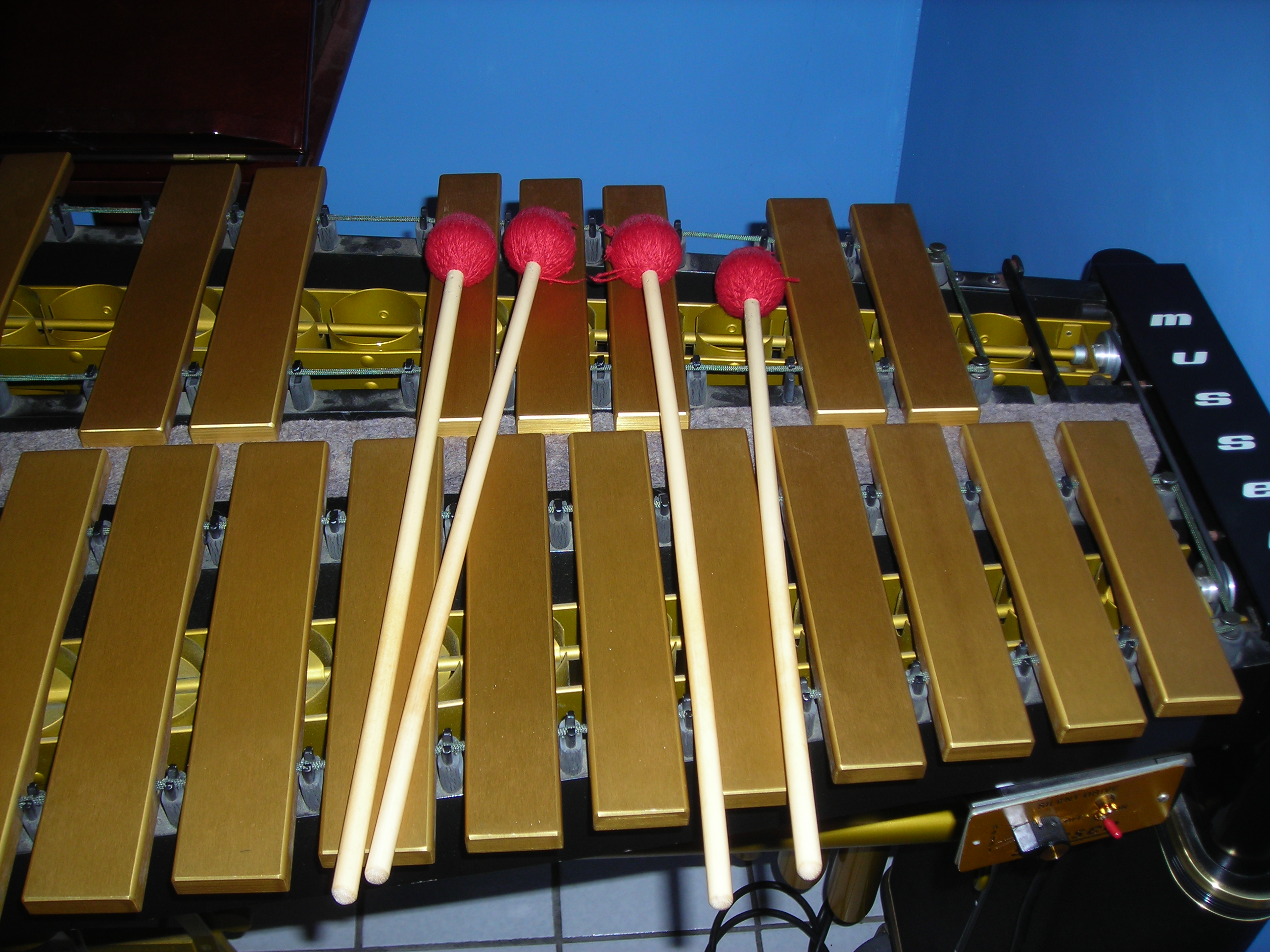 Vibraphone mallets